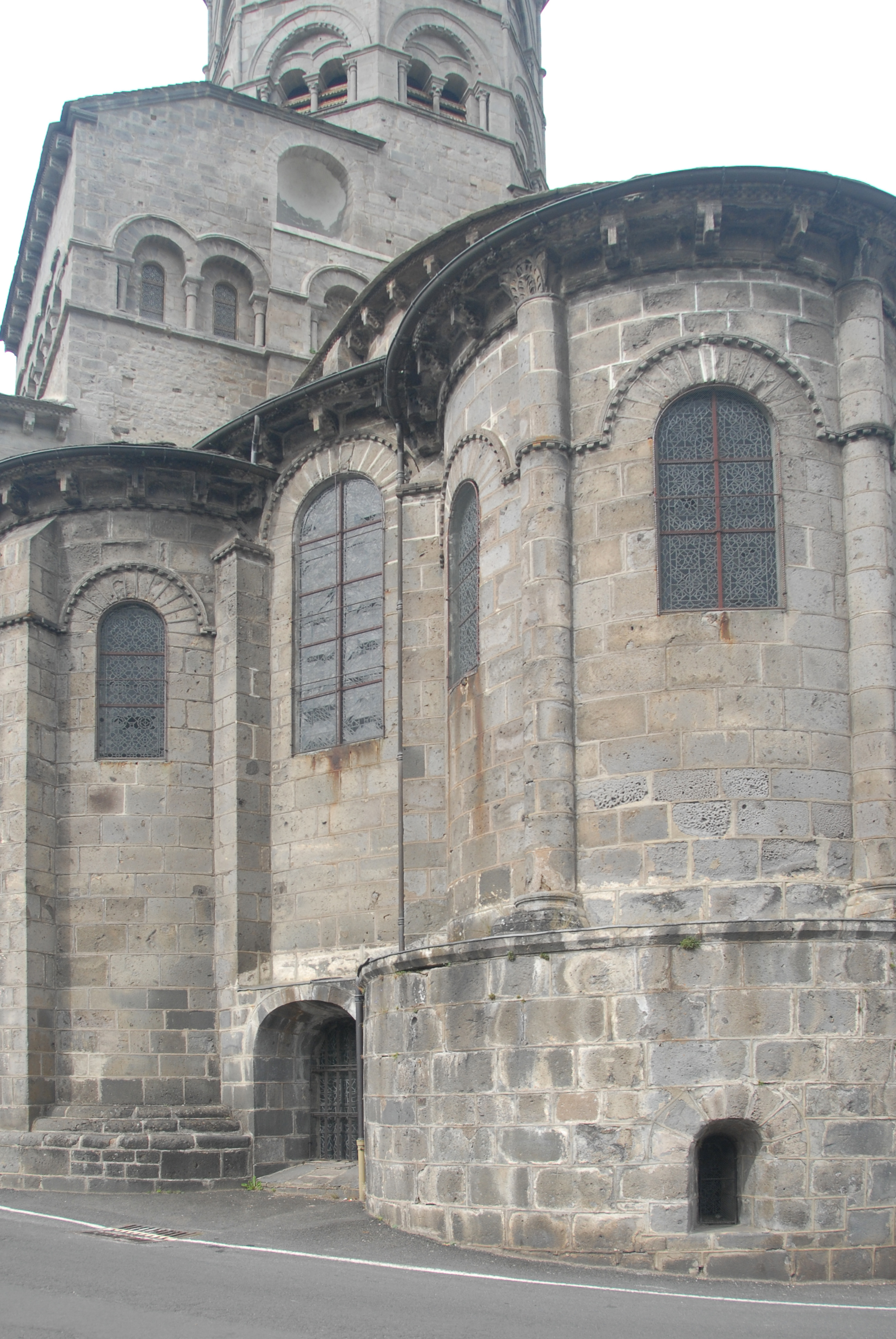 N.-D. d'Orcival, südl. Kranzkapellen